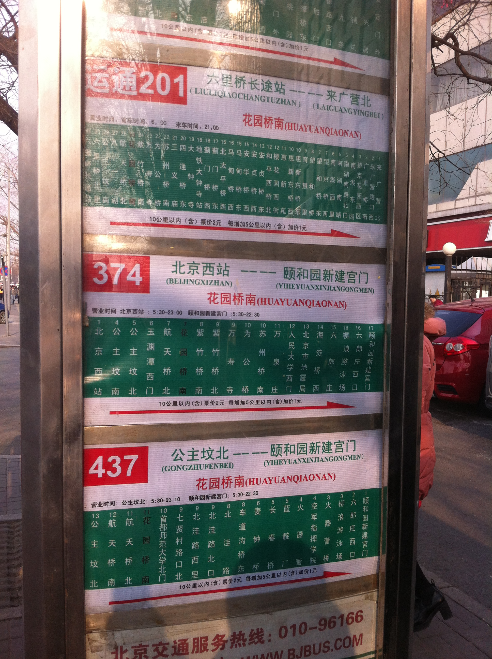 北京花园桥南公交站站牌